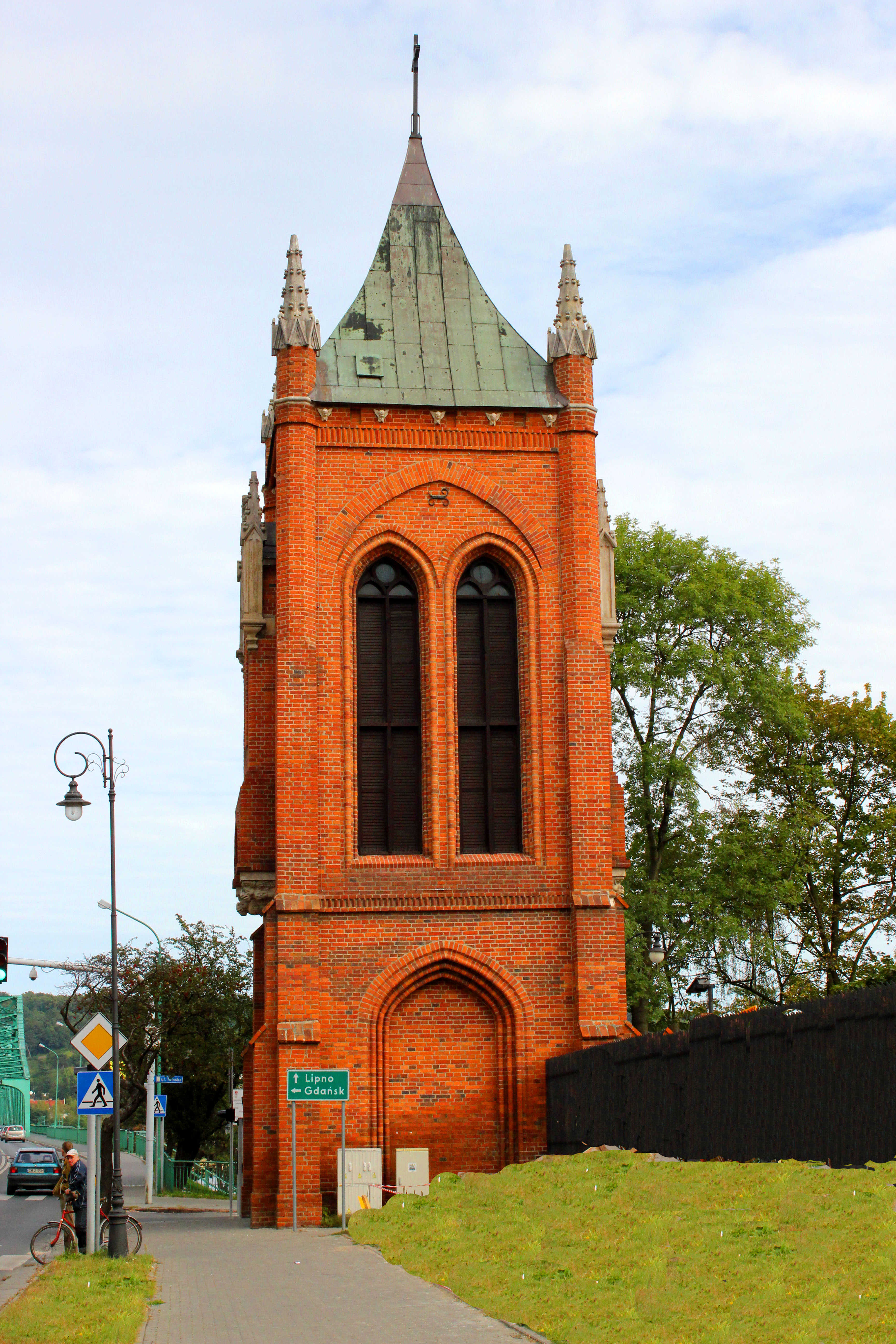 dzwonnica, 1854 Włocławek, pl. Kopernika 3, miasto Włocławek